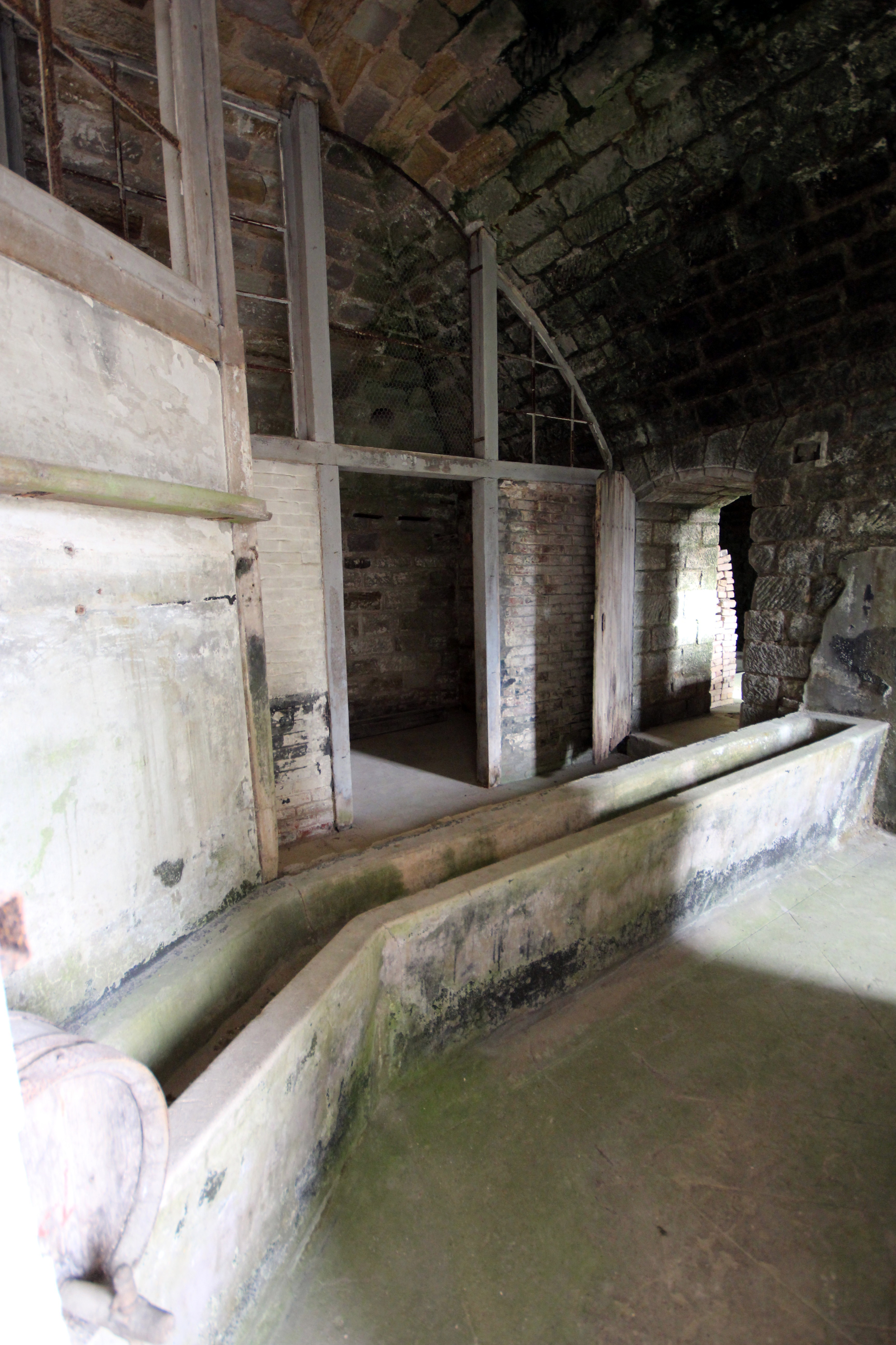 Le lavabo de troupe dans le casernement du fort de Bois l'Abbé